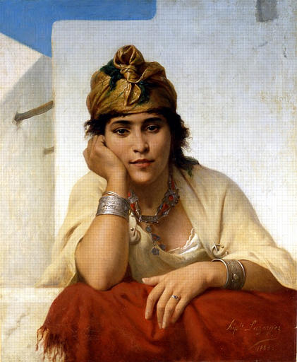 Rêverie